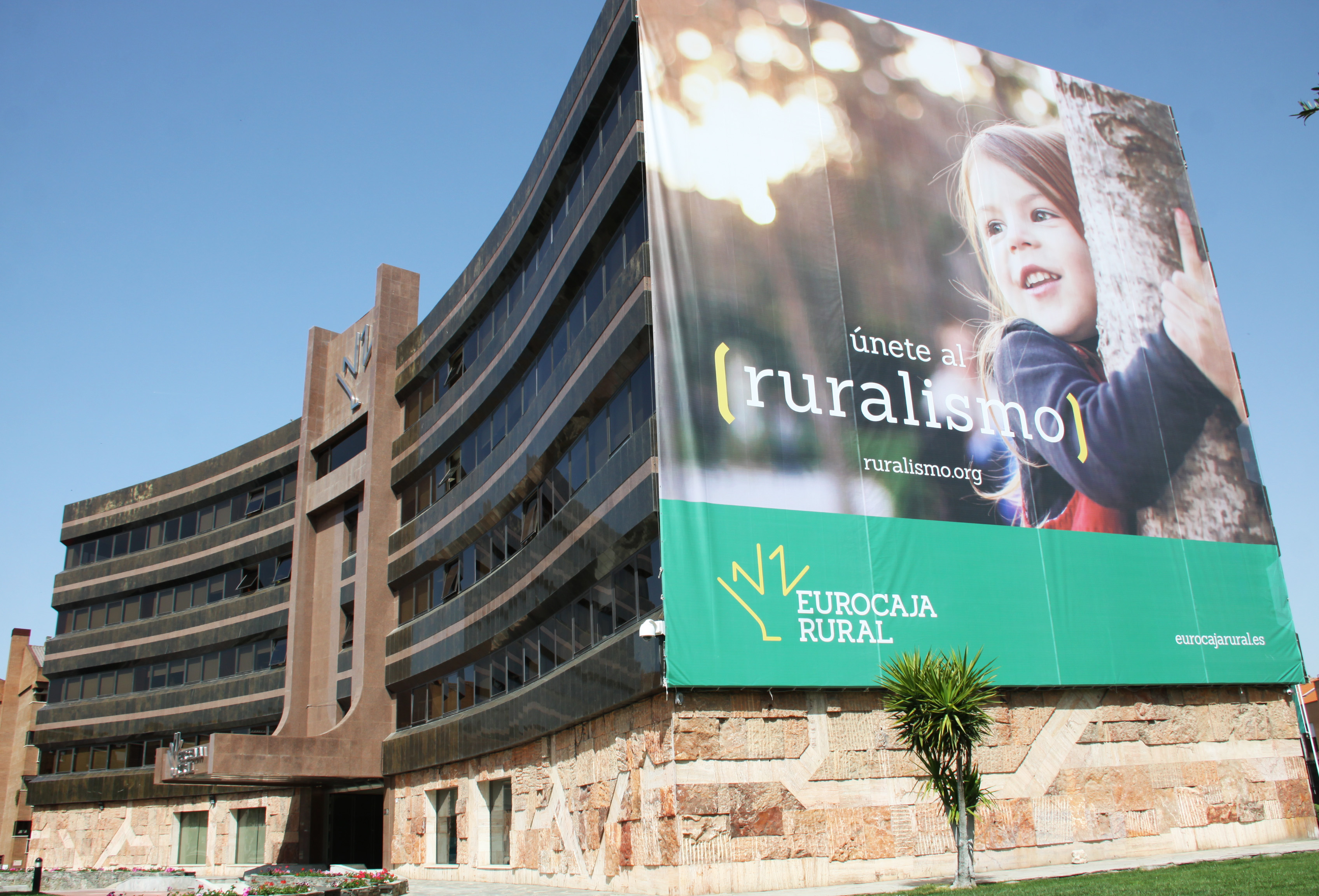 Sede central con la pancarta de Ruralismo en la fachada lateral